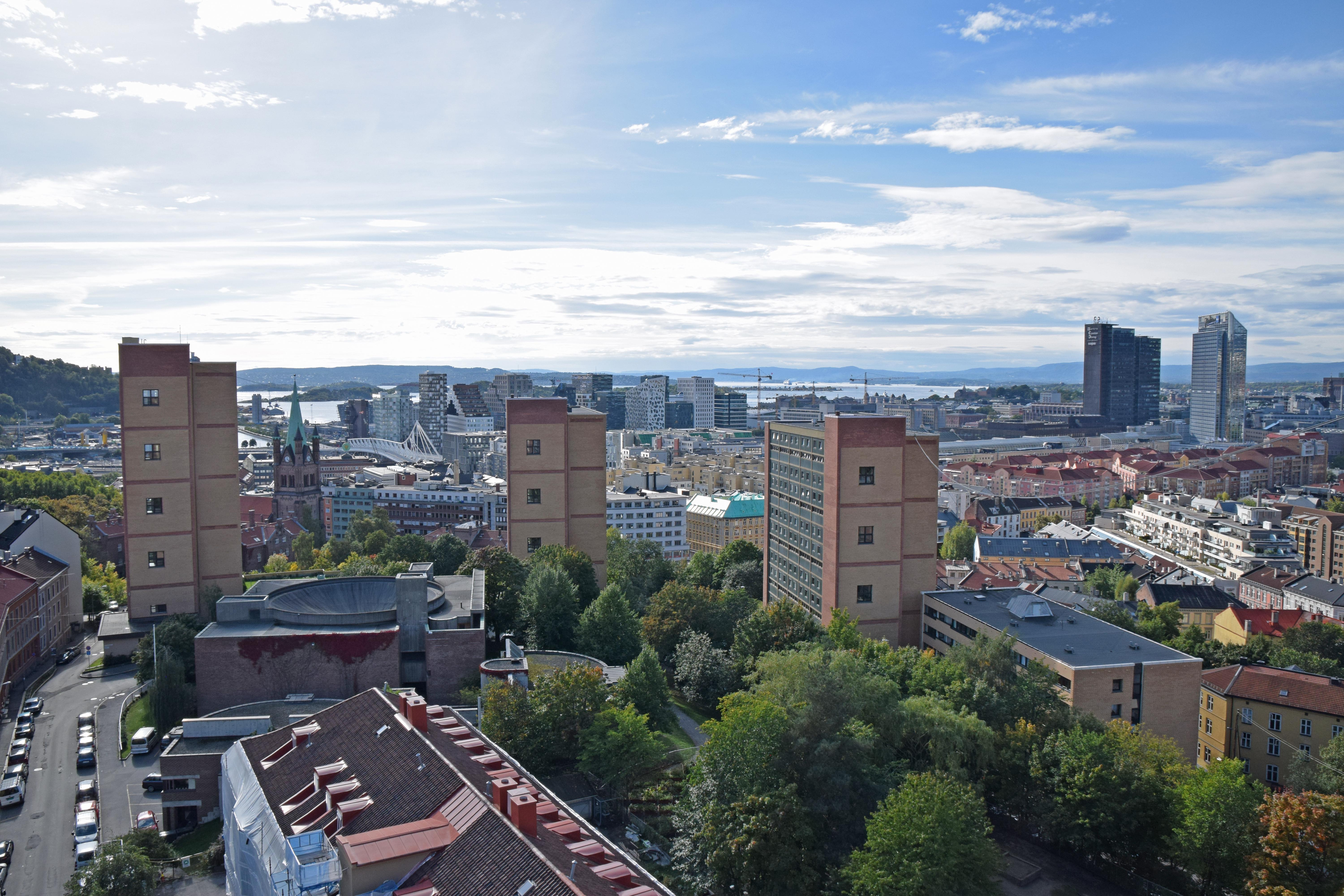 Enerhaugen sett fra 14. etasje i Smedgata 34. St. Hallvard kirke med kuppeltak til venstre i bildet.